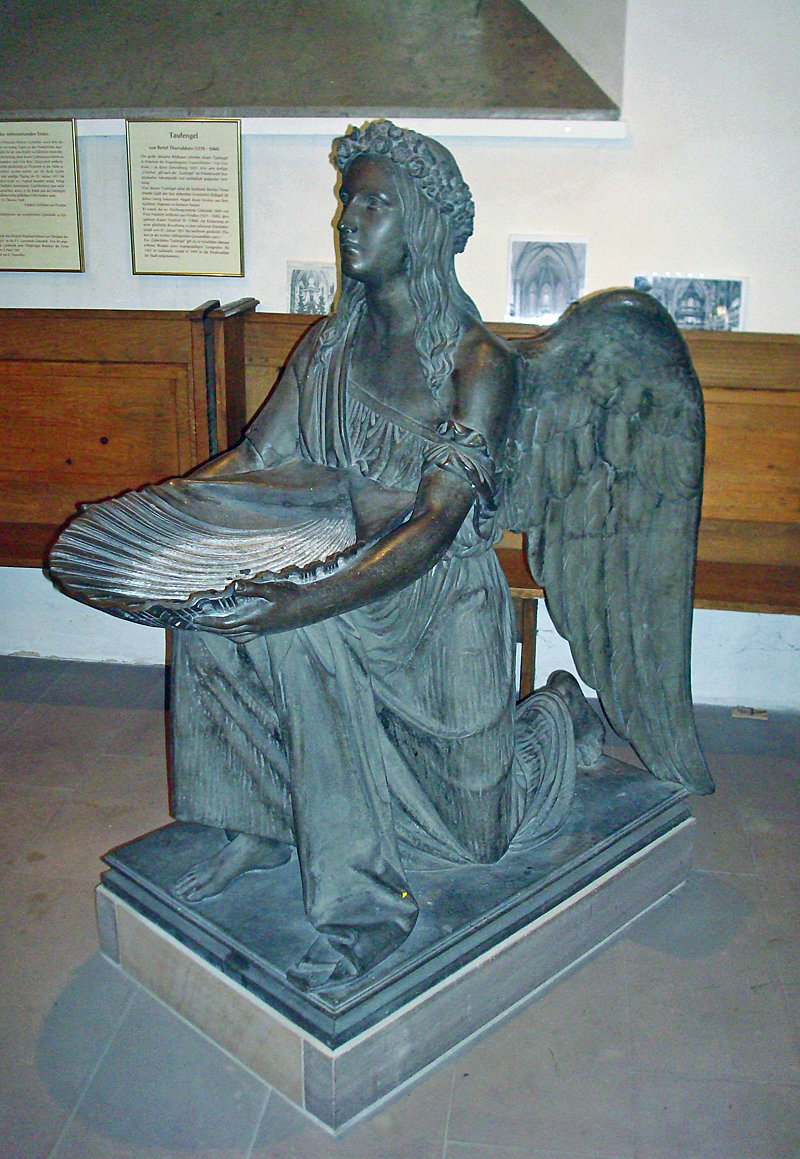 Taufengel in der Martin-Luther-Kirche Gütersloh von 1861, Zinkdruckguss nach Original von Bertel Thorvaldsen aus der Werkstatt Moritz Geiß, Berlin, Schenkung Friedrich III. an die Evangelische Kirchengemeinde Gütersloh